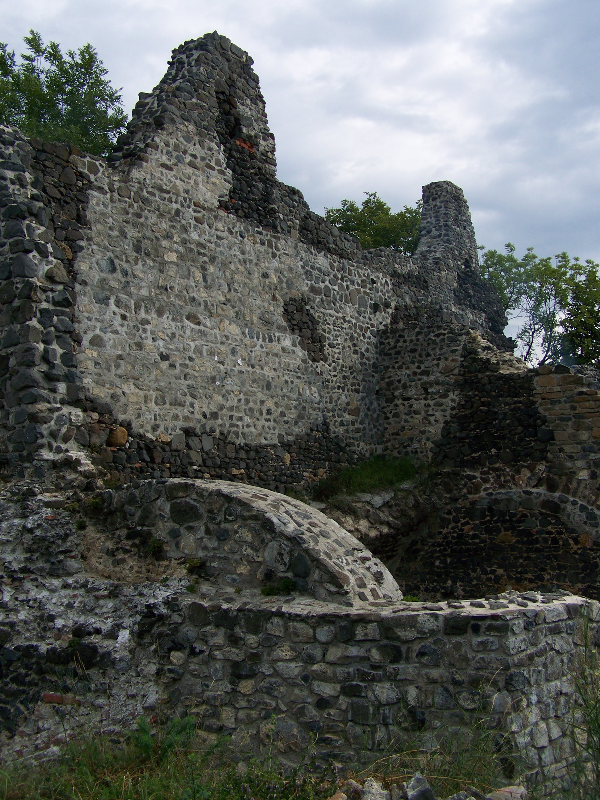 Tátika várrom (Zalaszántó, Kültelek) This is a photo of a monument in Hungary, Identifier: 11093